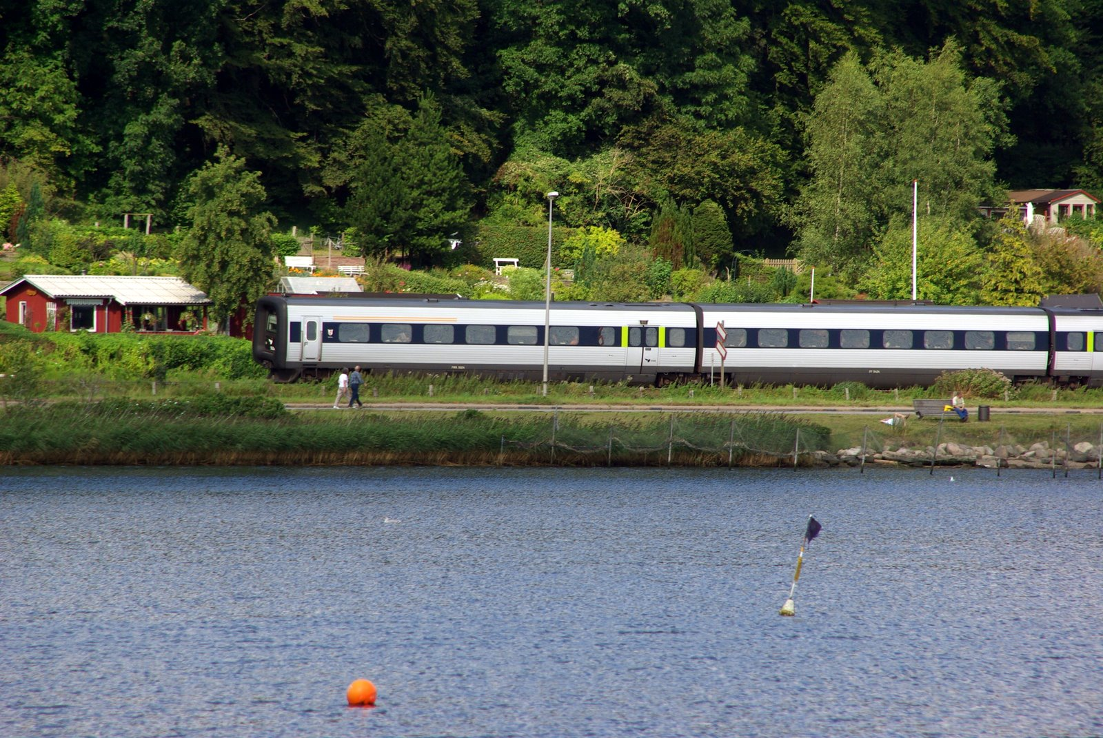 Taani regionaalrong IC3 Vejle fjordi kaldal